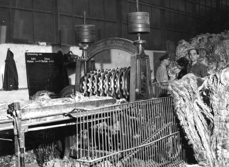 2.11.1953 Vereinigte Jute-Spinnereien und Webereien A.G., Hamburg, Werk Beuel Brecher oder Opener, die erste Maschine im Produktionsgang